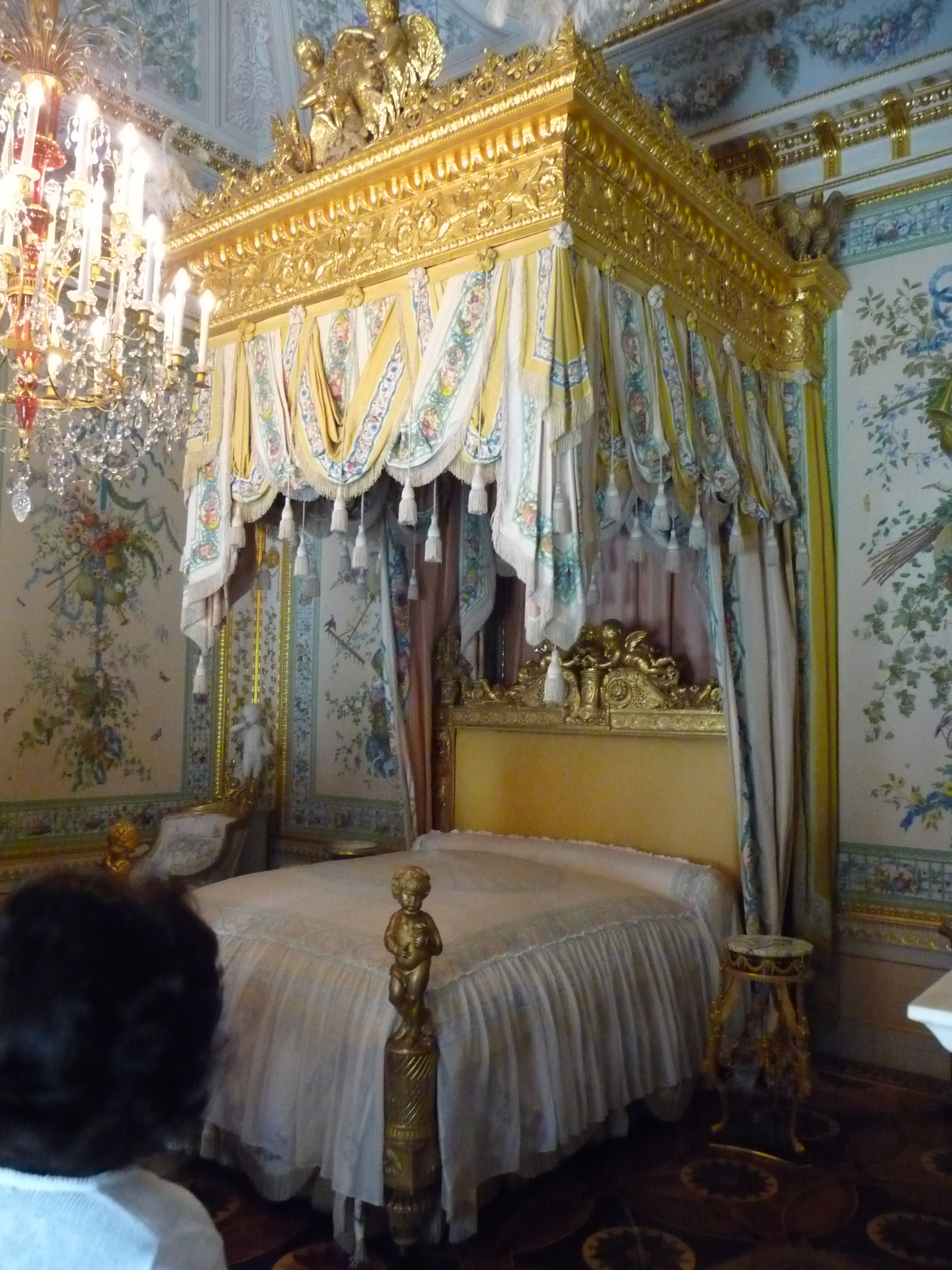 Palace-bed-p1030773.jpg